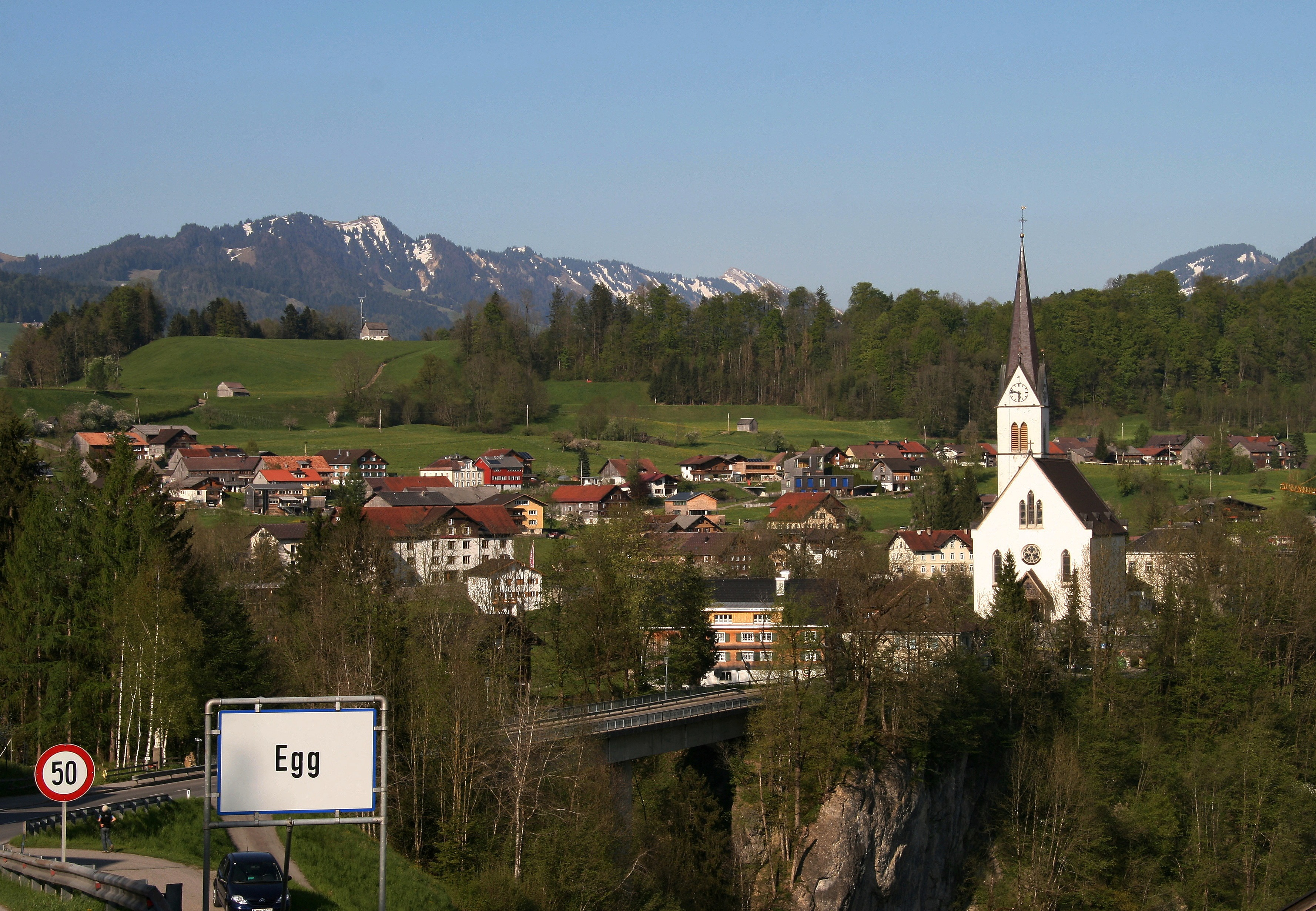 Blick von Kammern in Egg, Vorarlberg auf die Pfarrkirche.